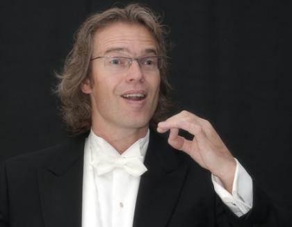 componist Carl Wittrock